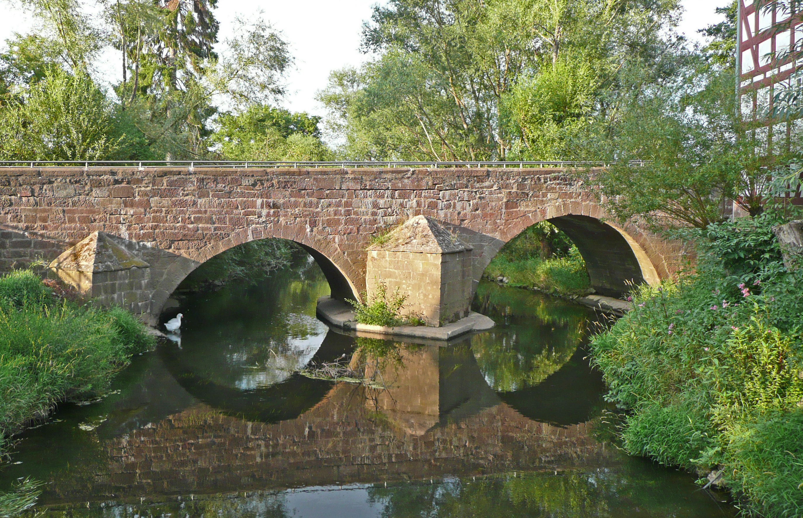 Westlicher Teil der alten Ohmbrücke (1722) an der Brücker Mühle bei Amöneburg von S, Hessen.